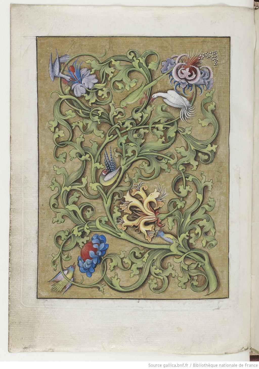 LHCAMoleiro